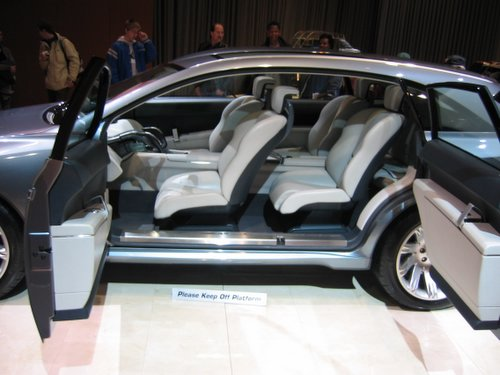 Lexus HPX